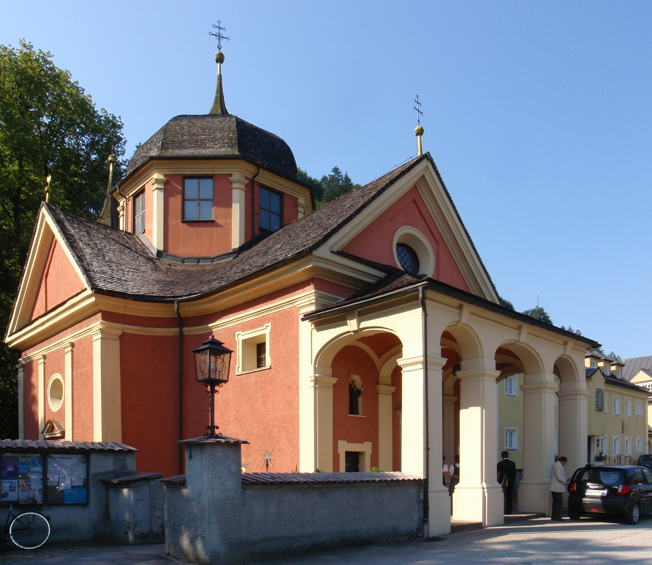 Wallfahrtskirche "Maria Hilf" in Kufstein-Kleinholz; eigene Aufnahme des Autors